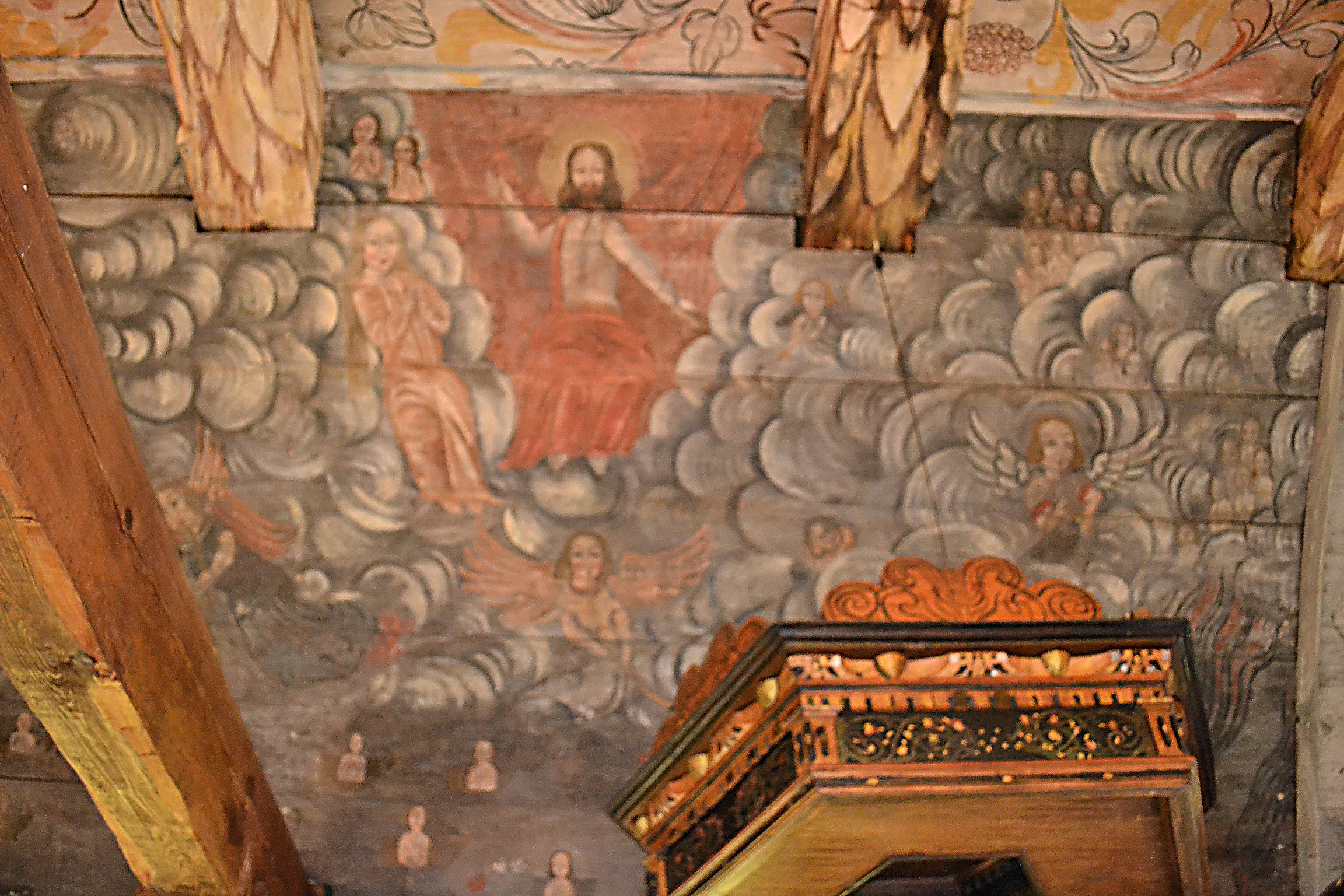 Kościół w Dzisnej (województwo zachodniopomorskie)